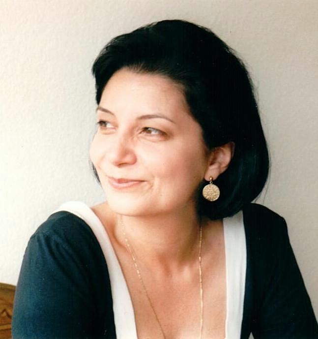 Художник-иллюстратор. Заслуженный художник РФ.